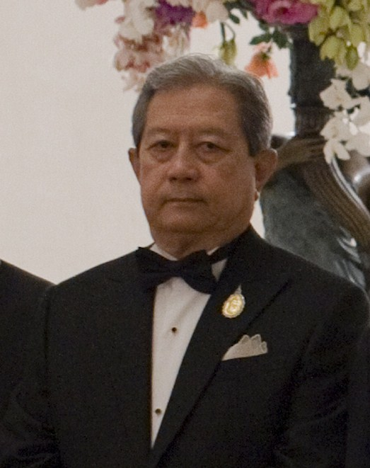 นายกรัฐมนตรี และภริยา เข้าเฝ้าทูลละอองพระบาท สมเด็จพระเทพรัตนราชสุดาฯ สยามบรมราชกุมารี ในงานพระราชทานเลี้ยงอาหารค่ำแก่ผู้ได้รับพระราชทานรางวัลสมเด็จเจ้าฟ้ามหิดล ประจำปี 2553 และกล่าวเชิญชวนดื่มถวายพระพร ณ พระที่นั่งบรมราชสถิตยมโหฬาร ในพระบรมมหาราชวัง วันพุธ ที่ 26 มกราคม พ.ศ.2554 (Photographer attached to the Prime Minister of the Kingdom of Thailand : Peerapat Wimolrungkarat / พีรพัฒน์ วิมลรังครัตน์) @is50mm